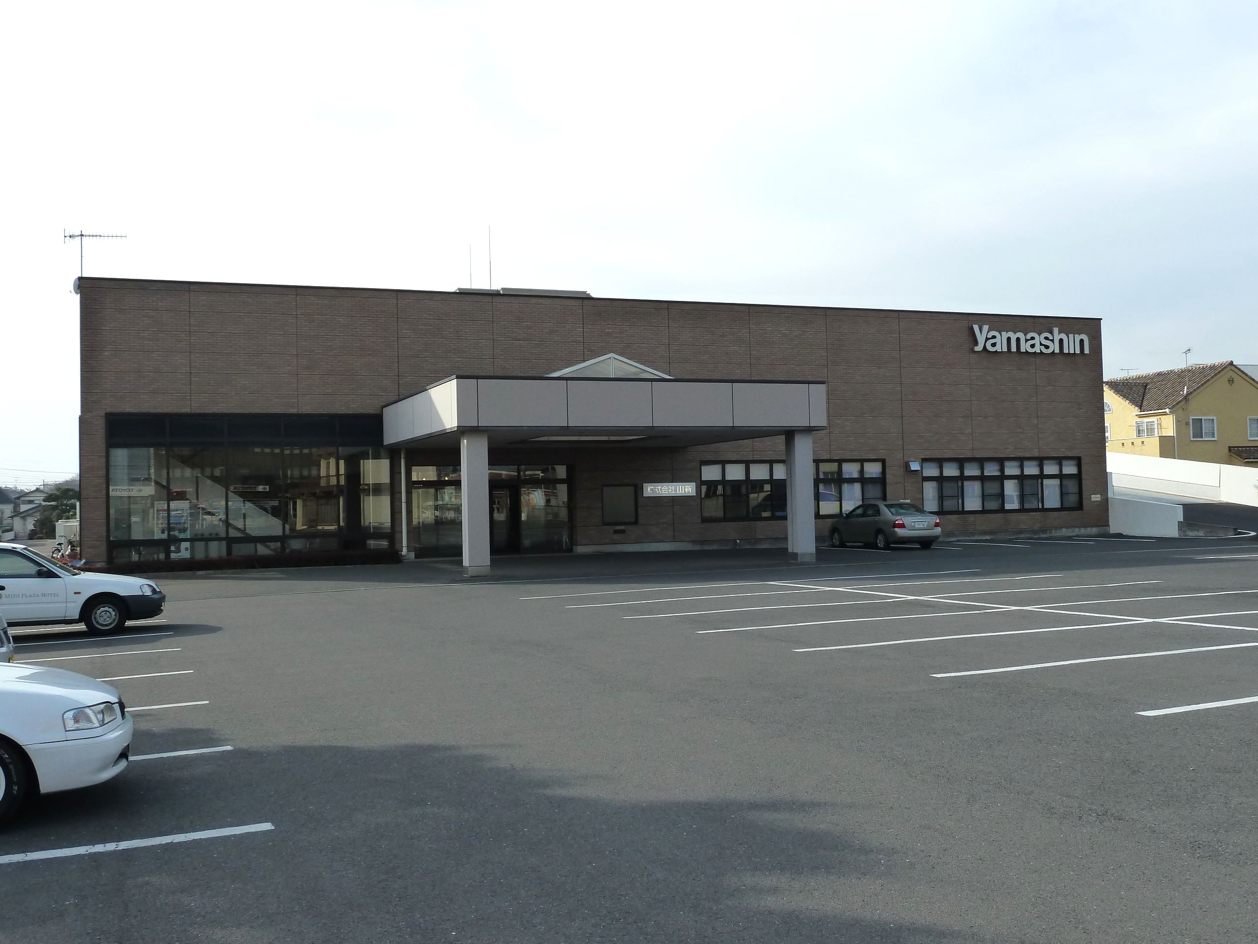 株式会社山新本社